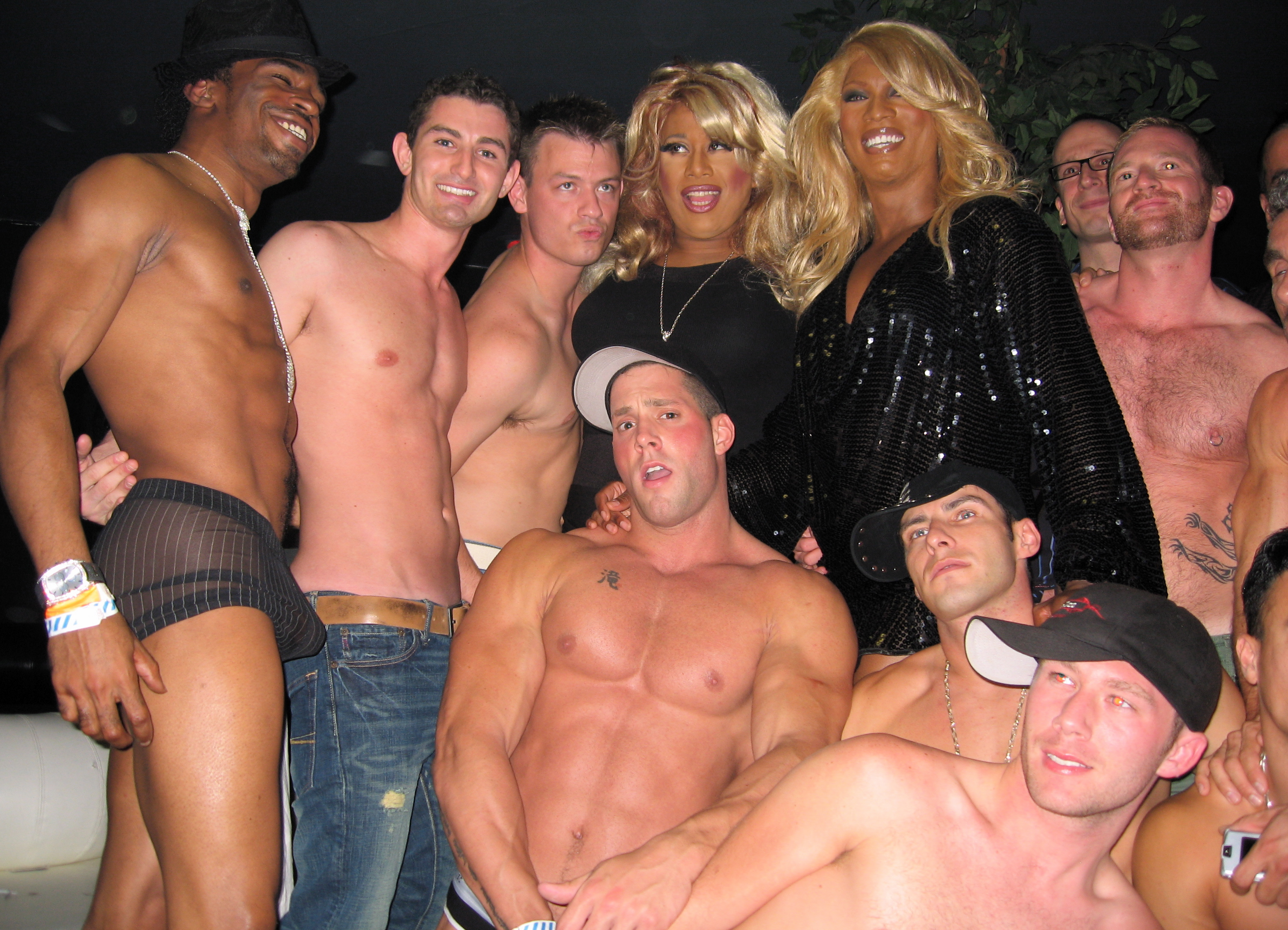 Primeiro Annual Male Escort Awards. Erik Rhodes (centro), Adam Faust & outros